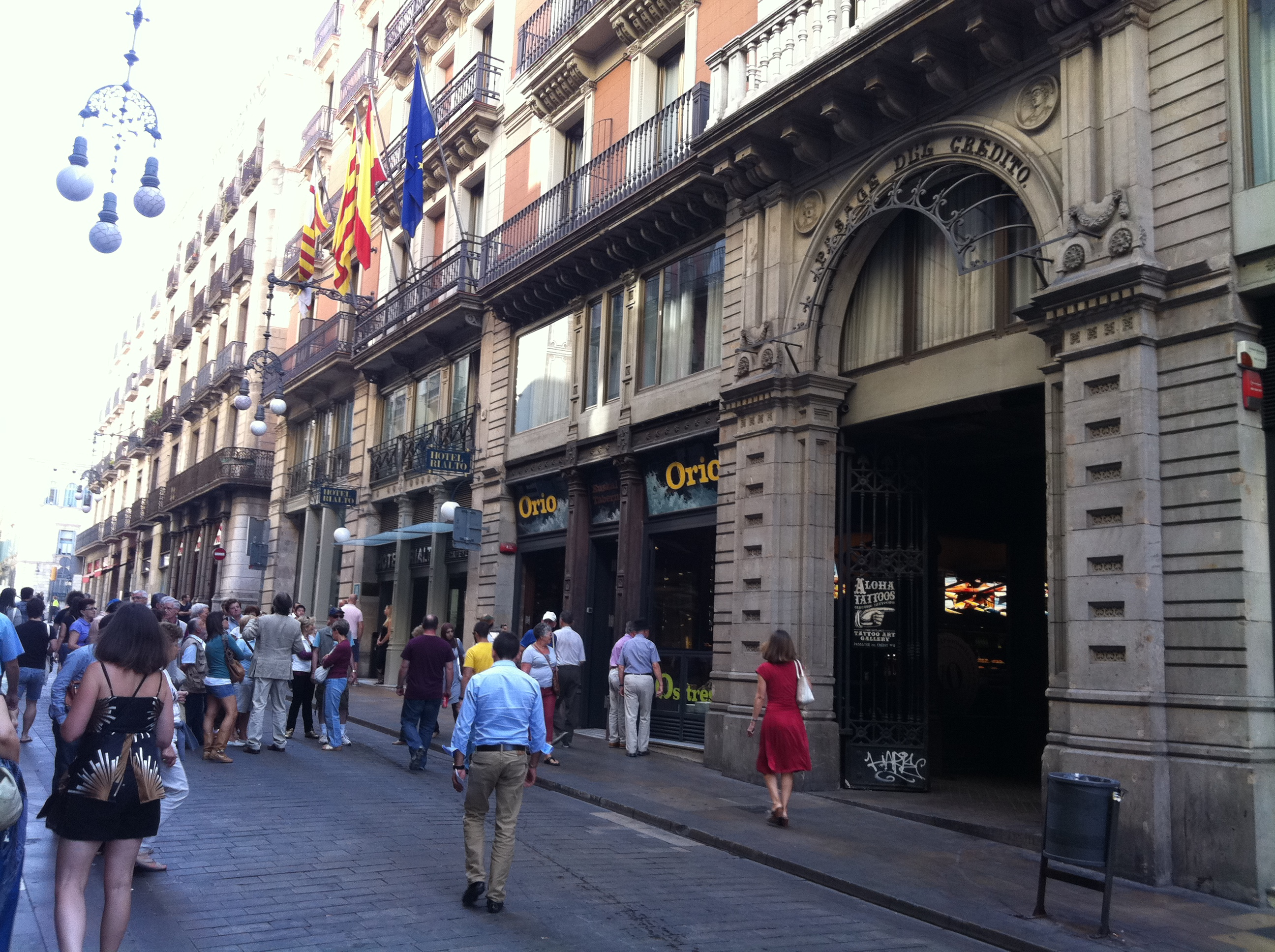 Passatge del Crèdit